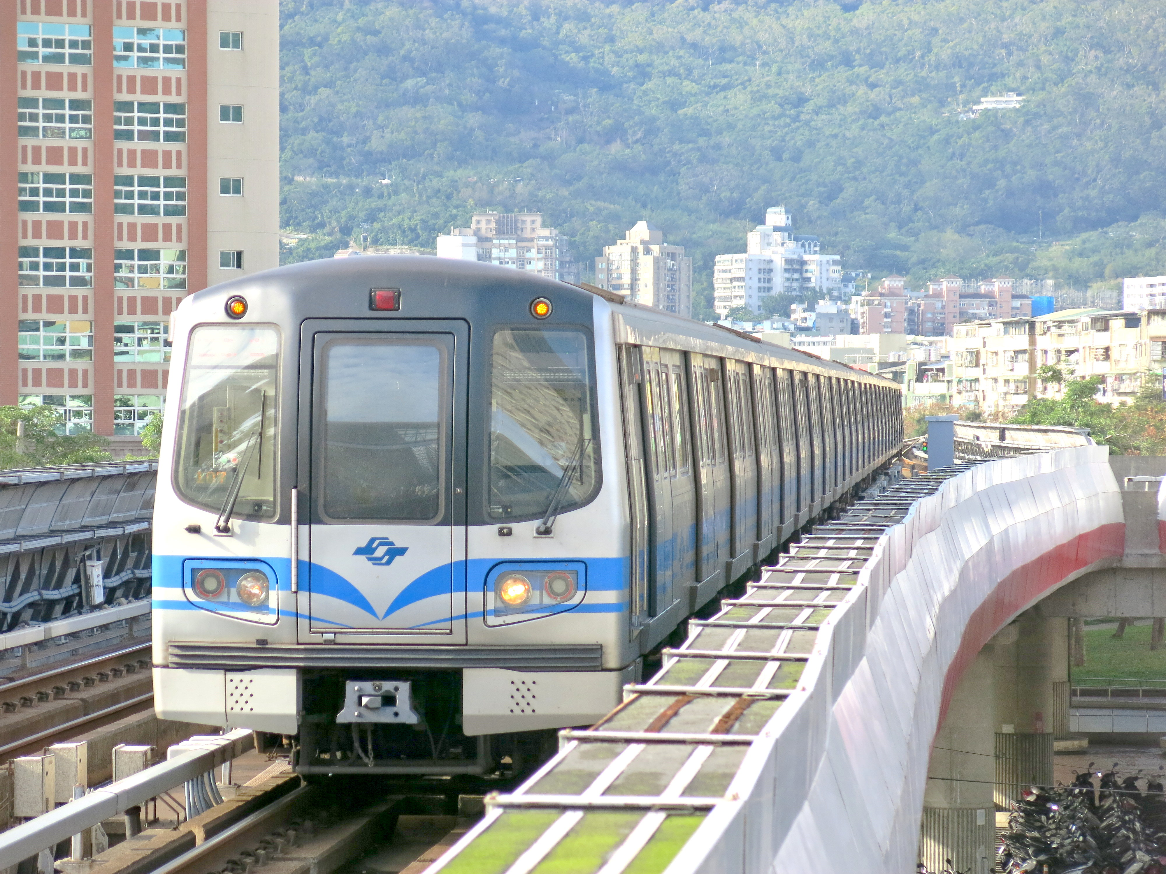 中文（台灣）: 381型進入北投站